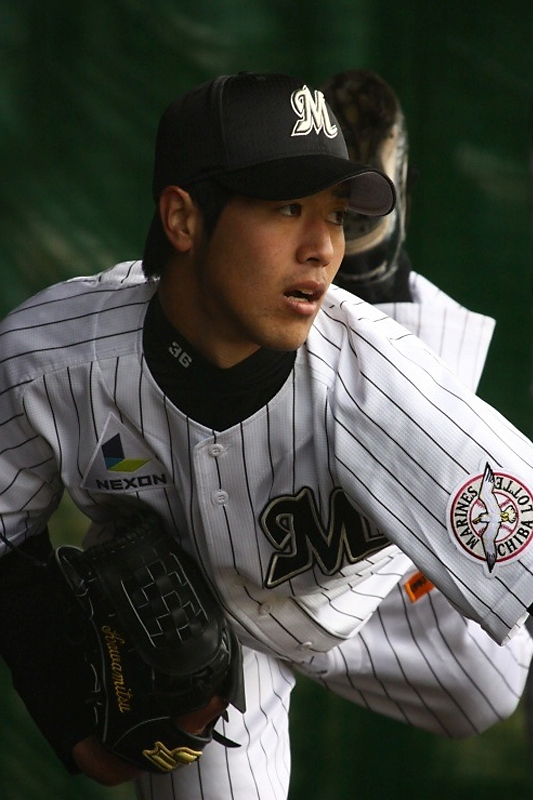 日本プロ野球 千葉ロッテマリーンズ 川満寛弥投手